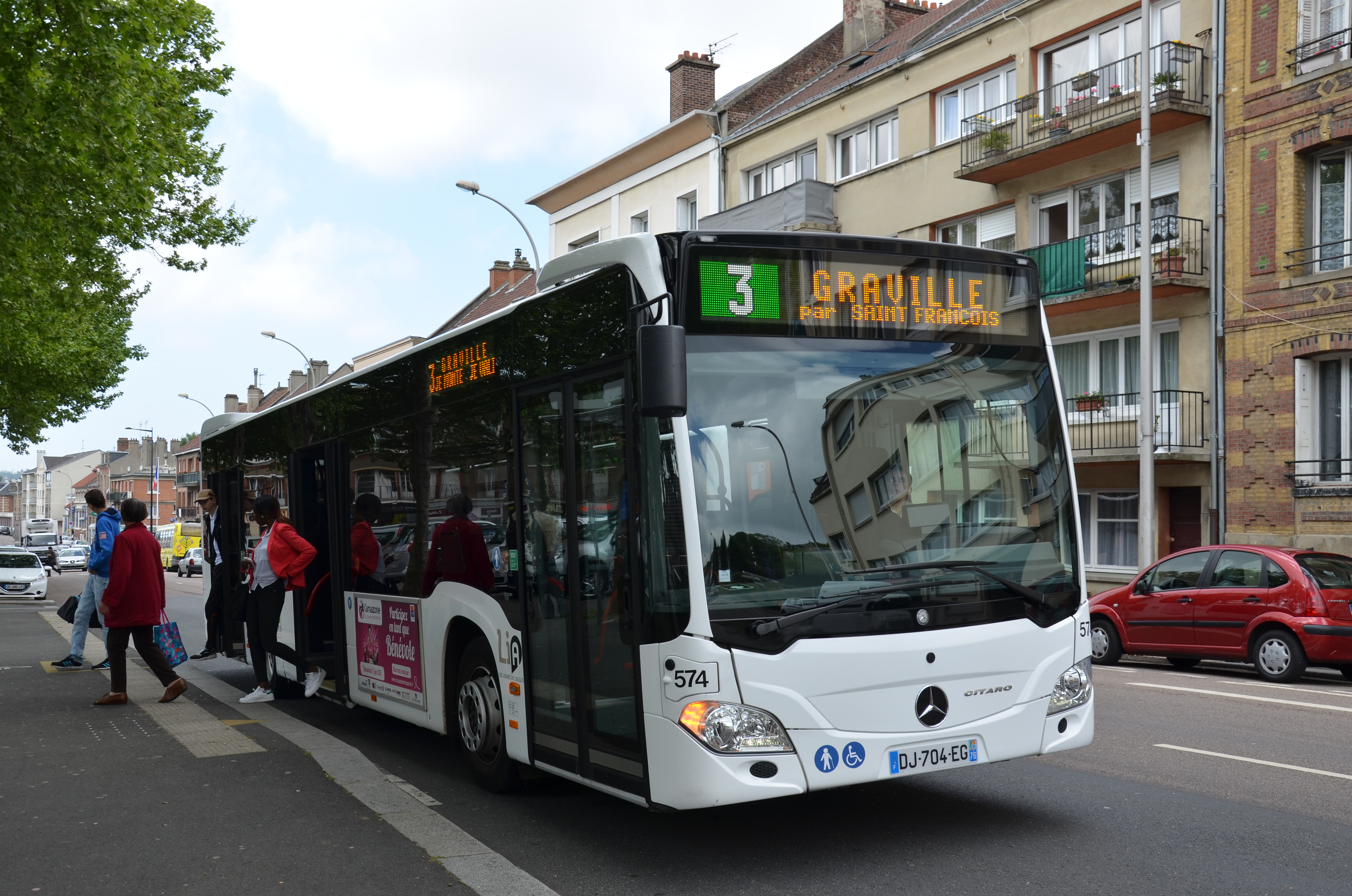 Mercedes Citaro C2 n°574 sur la ligne 3 du réseau LiA du Havre, à son terminus Graville.